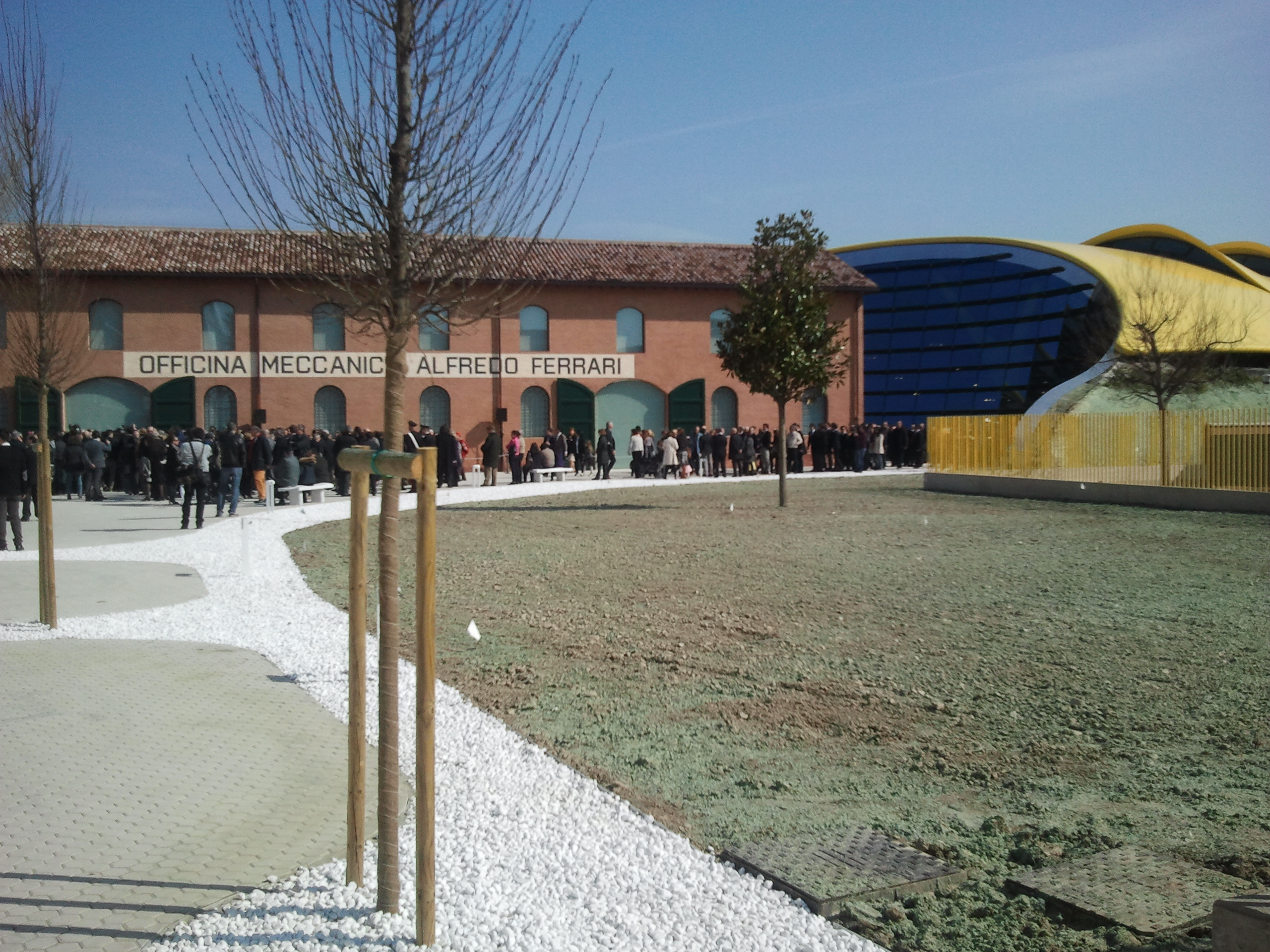 Museo Casa Enzo Ferrari (MEF): From the front gate This is a photo of a monument which is part of cultural heritage of Italy.